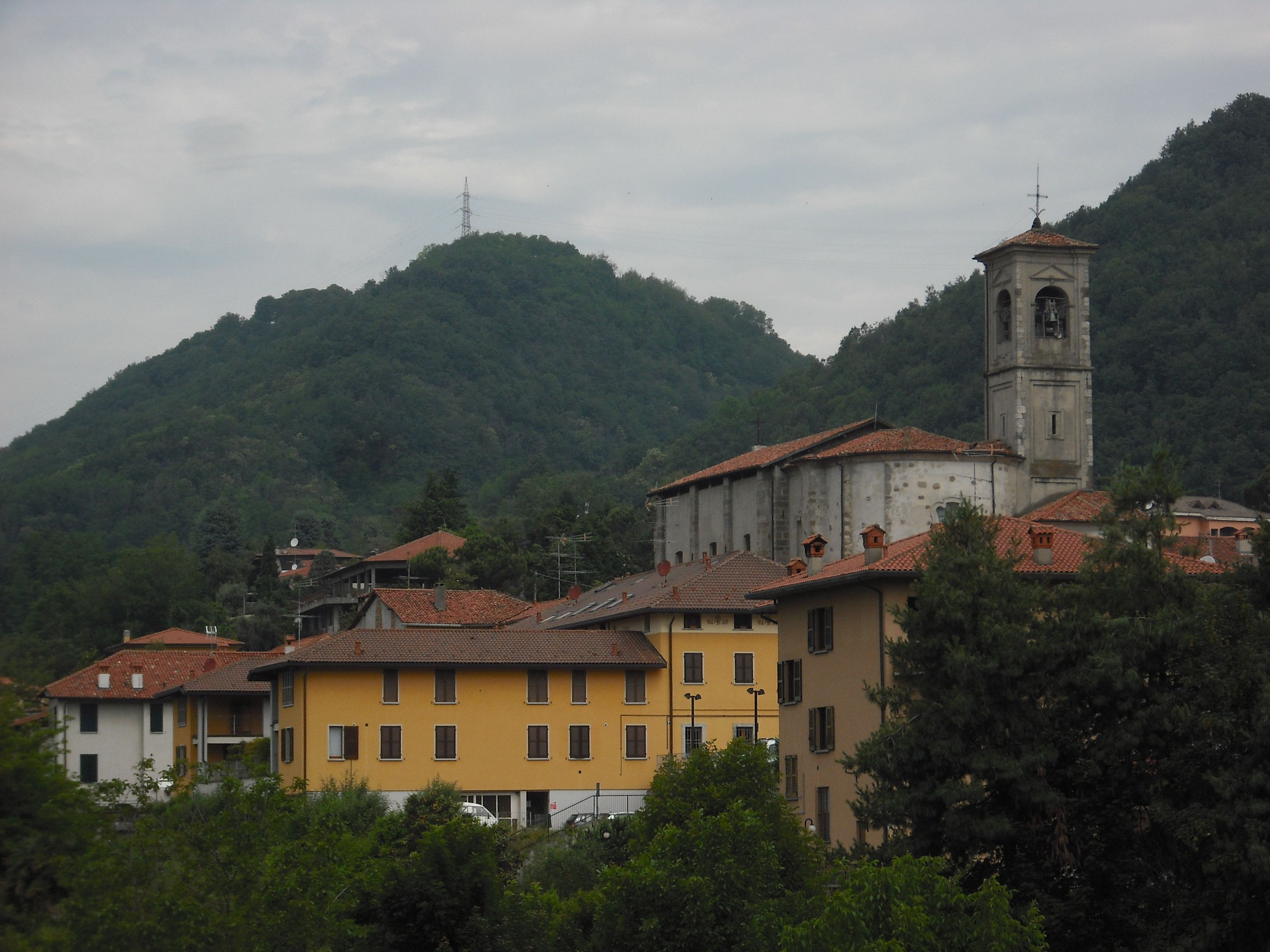 La chiesa parrocchiale di Santa maria Hoè (Lc)